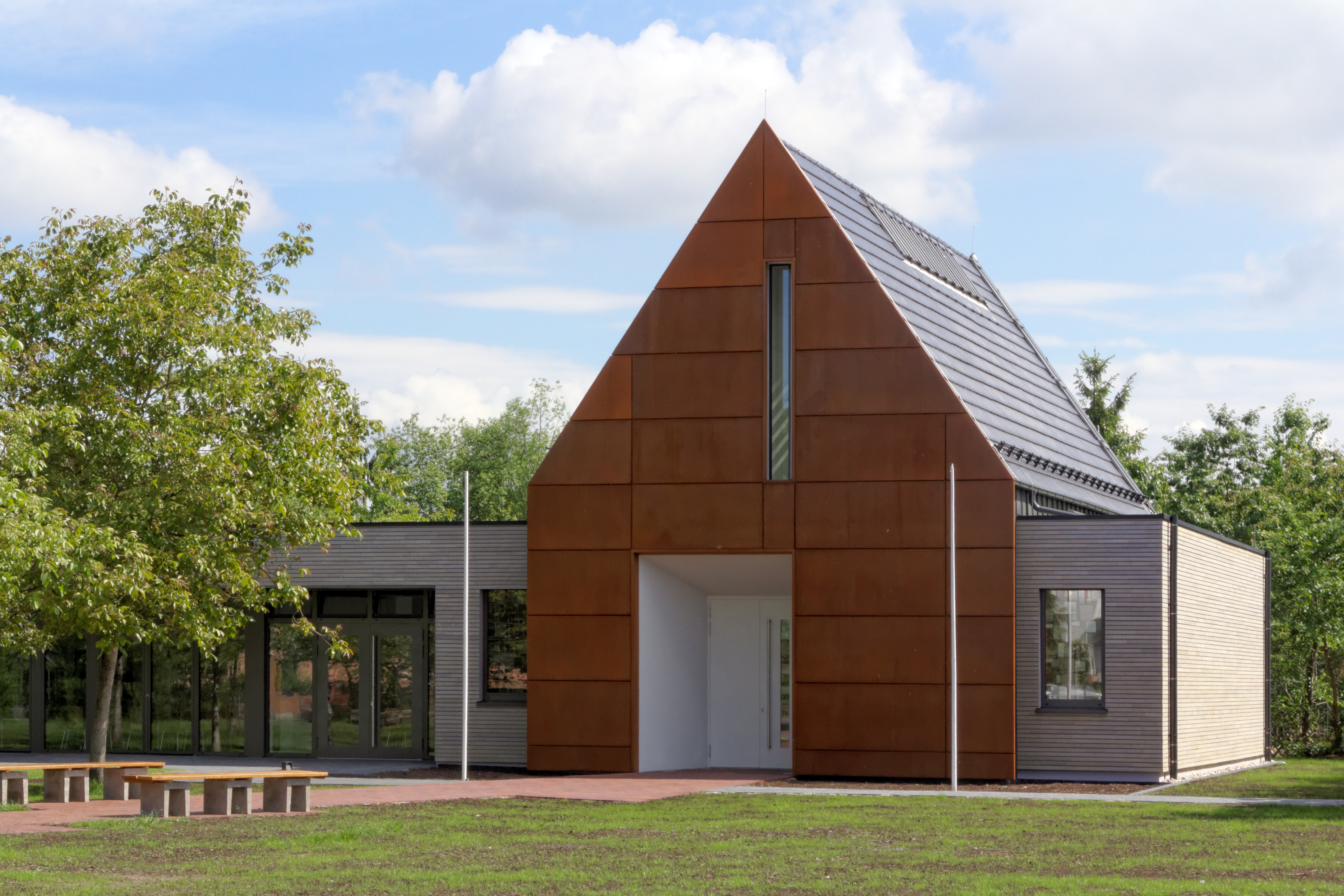 Heilig-Kreuz-Kirche in Rollwald, Stadt Rodgau (Hessen), erbaut 2014.